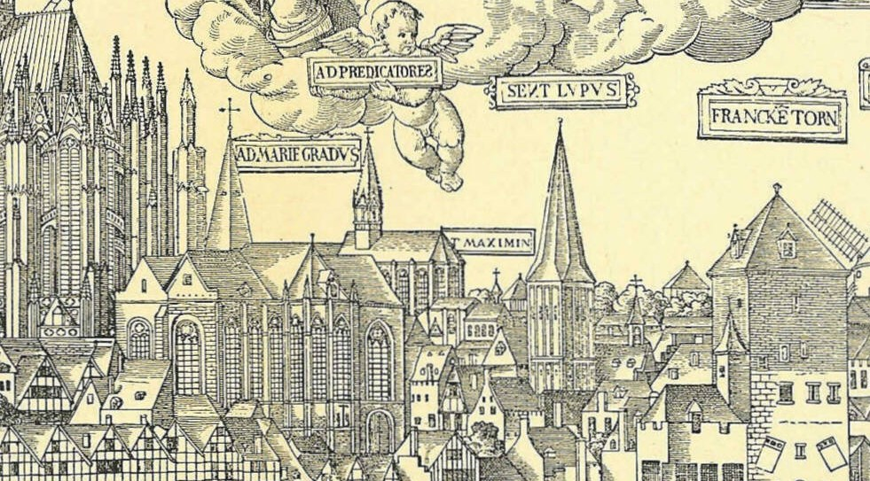 Bildaussschnitt aus der Kölner Stadtansicht von Anton Woensam von 1530.